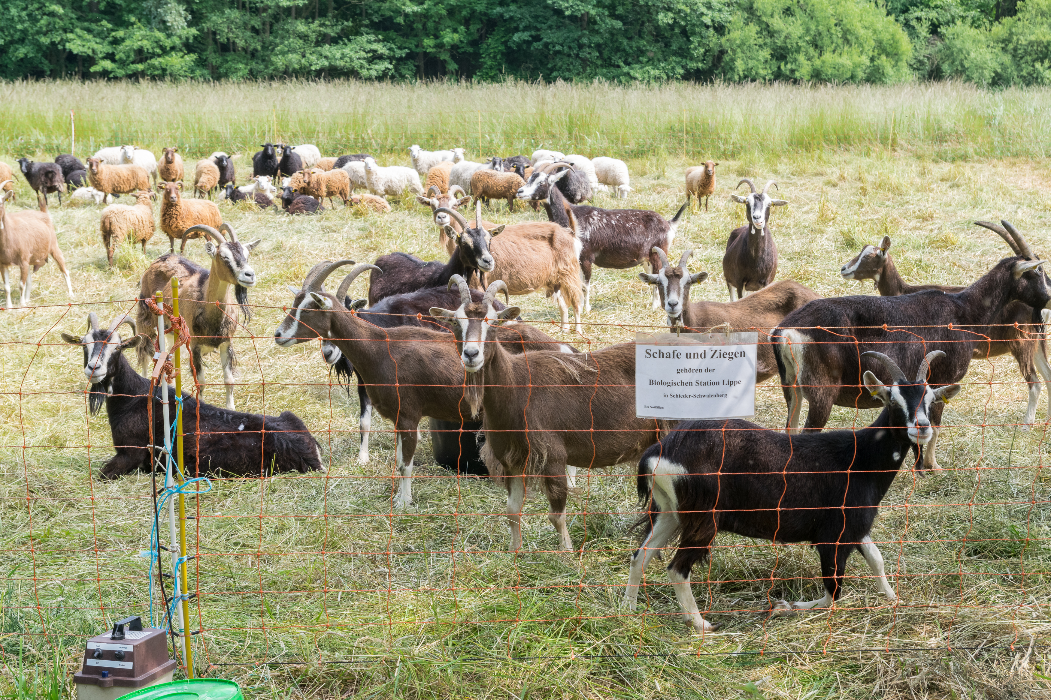 Naturschutzgebiet Talsystem des Königsbaches in Blomberg-Borkhausen, Kreis Lippe; Schafe und Ziegen der Biologischen Station Lippe beweiden die Bachauen